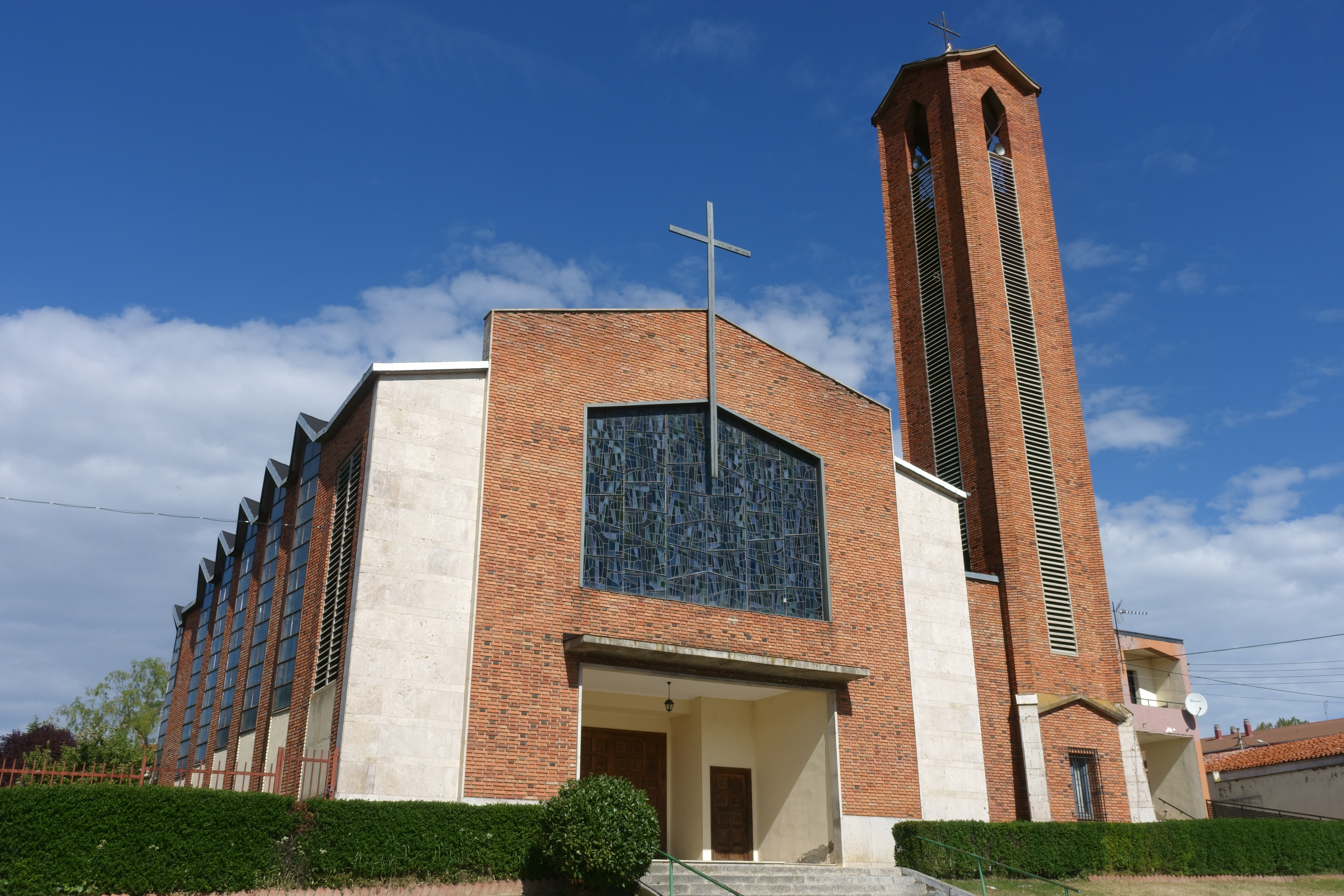 Iglesia de la Inmaculada Concepción, en Tardelcuende (Soria, España).